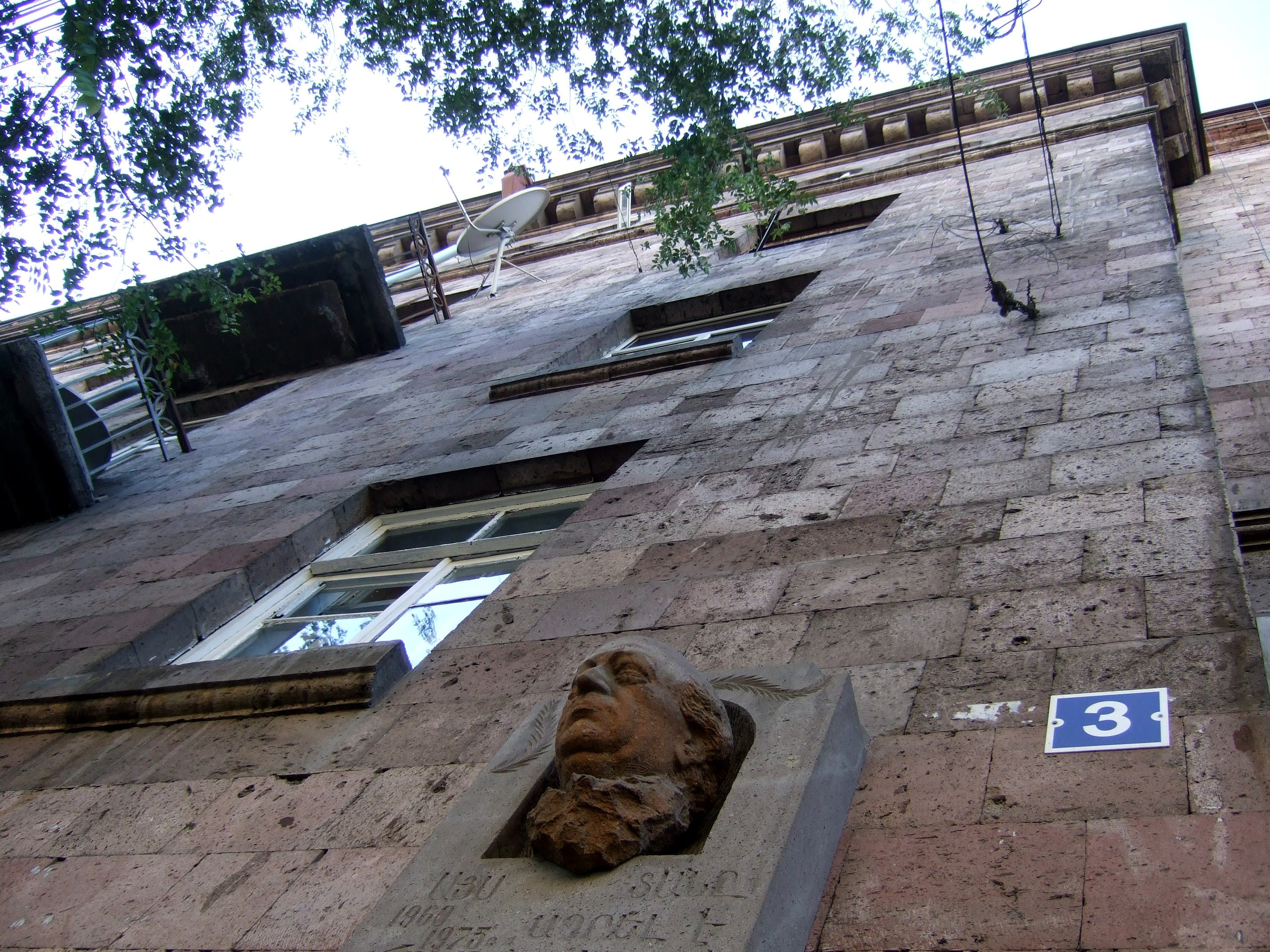 Այս տանը ապրել է հայ մեծ բանաստեղծ Համո Սահյանը, Կասյան փ․